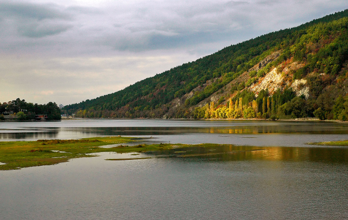 Езерото край Панчарево, Автор Пламен Ташев, 2006г.